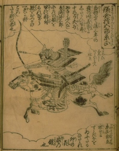 Kamakura Gongorō from Ehon-Shahōbukuro (絵本写宝袋武者尽 鎌倉権五郎景政)